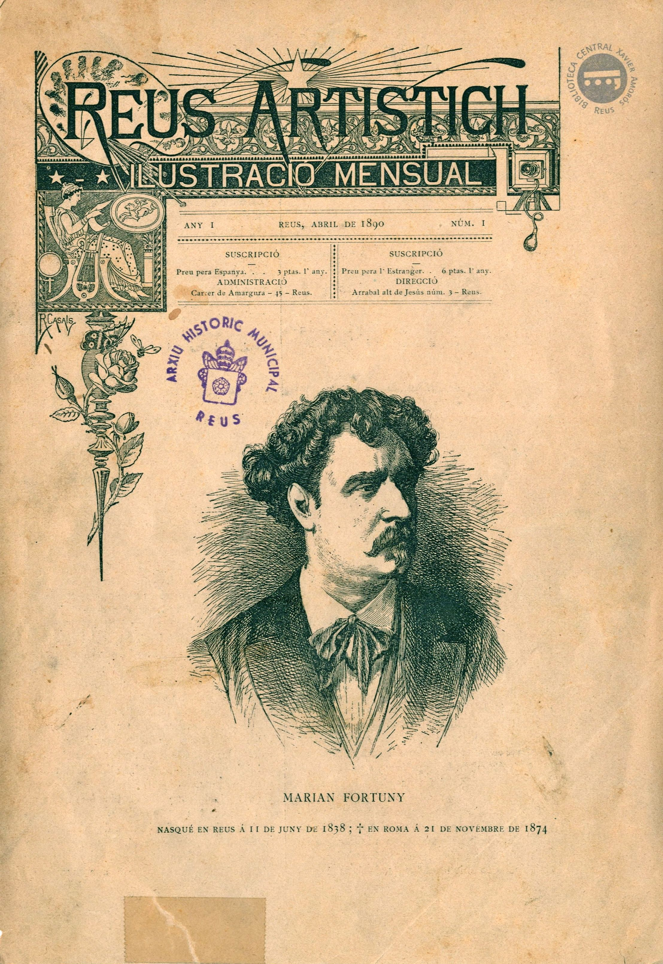 Primera pàgina del número 1 de Reus Artístich